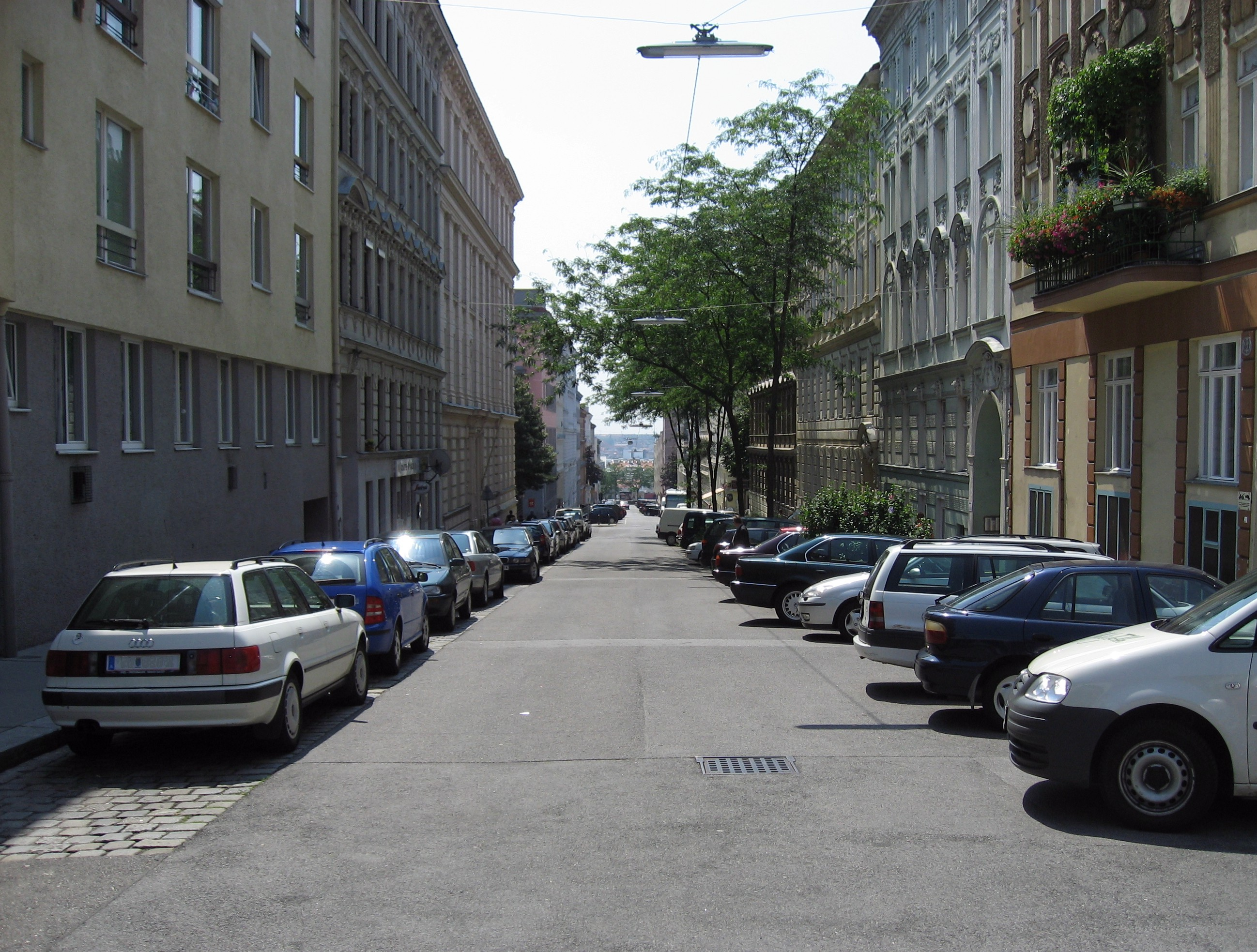 Kröllgasse in Wien